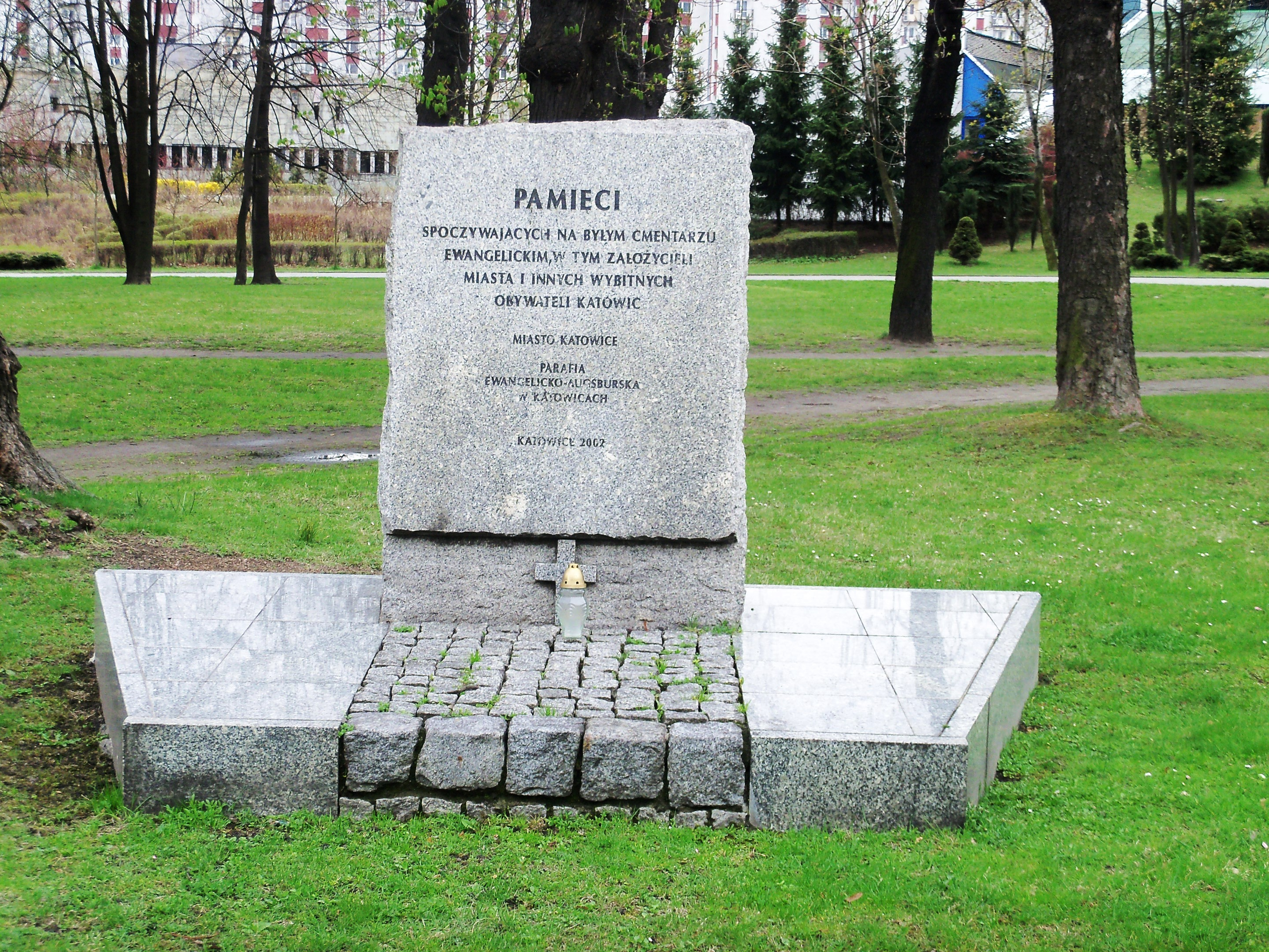 Tablica pamiątkowa na placy Rady Europy w Katowicach